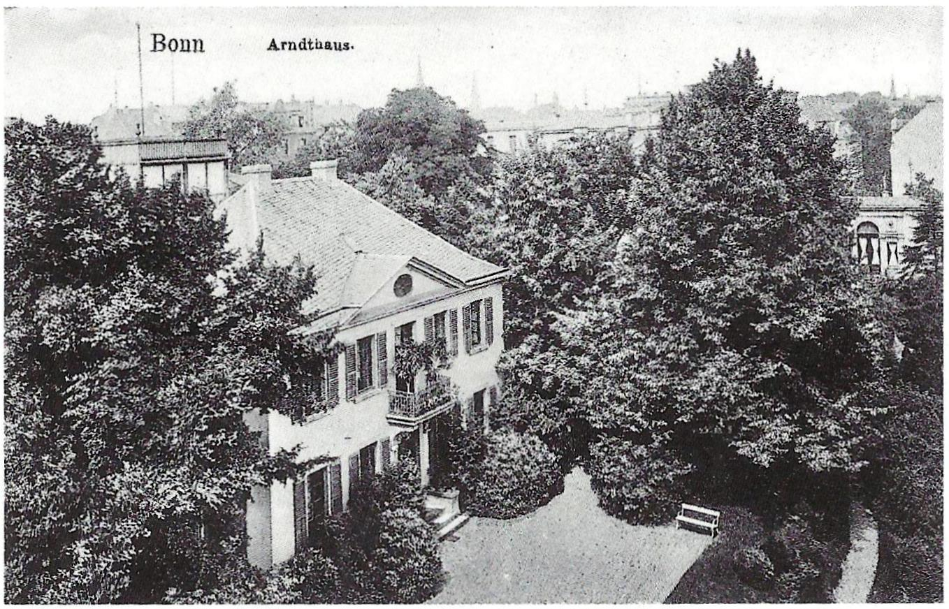 Ernst-Moritz-Arndt-Haus, Bonn: Rheinfront mit rheinseitigem Garten